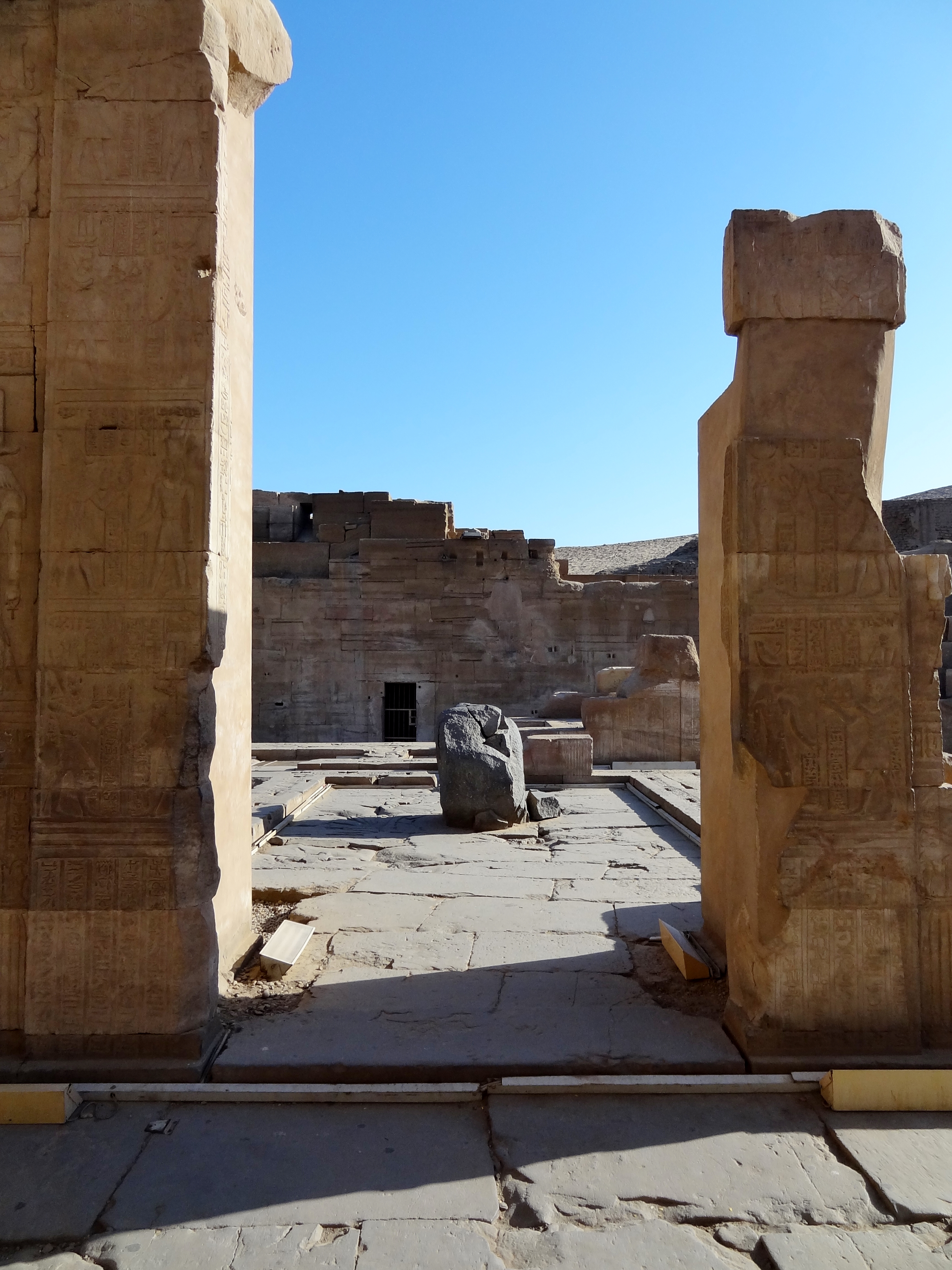 Zugang zum Heiligtum des Sobek im Tempel von Kom Ombo, Ägypten